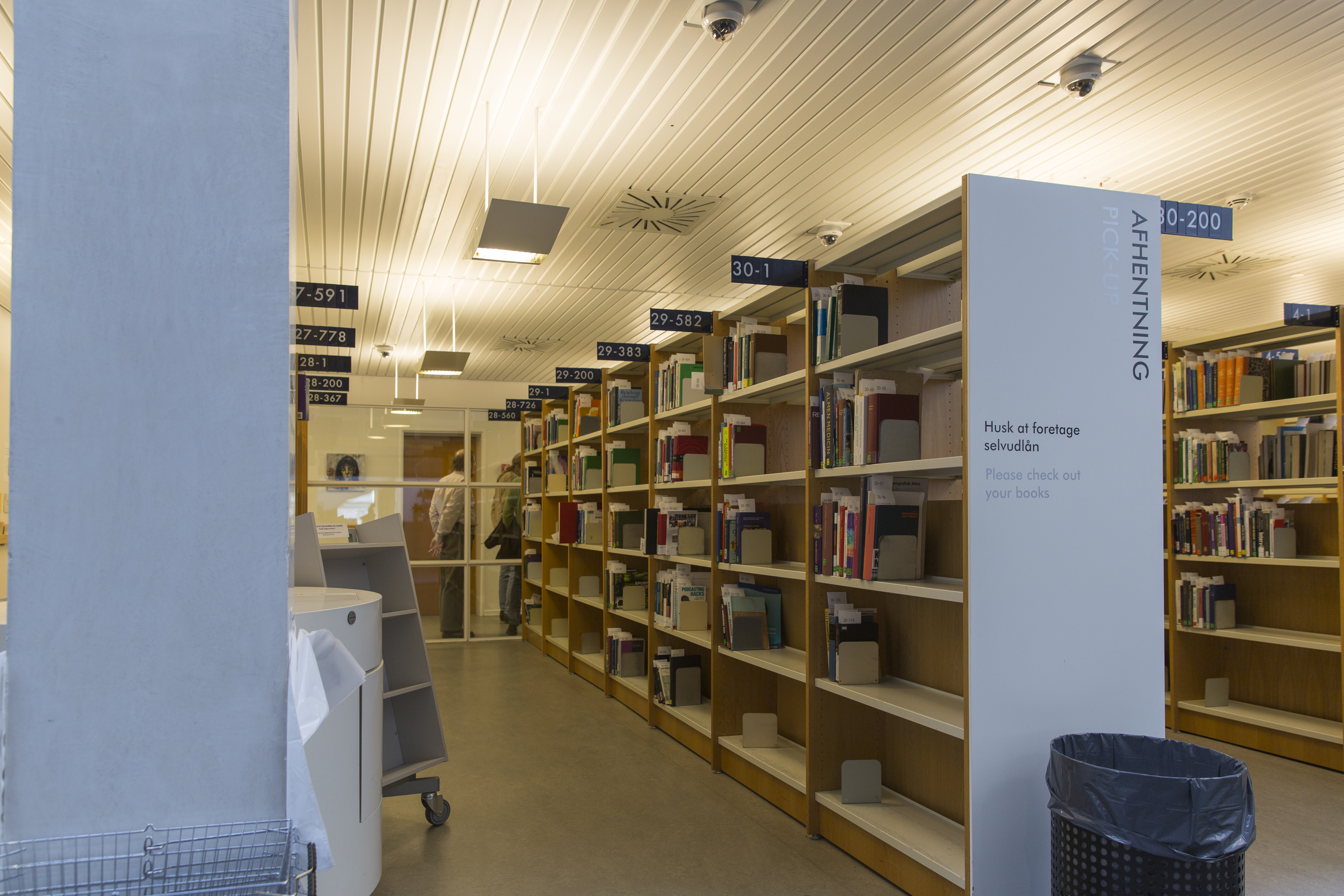 Statsbiblioteket - selvafhentning af bøger